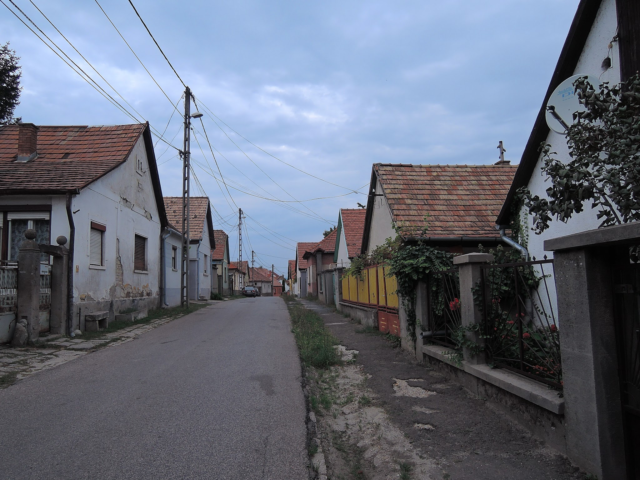 Tahitótfalu, Tótfalu, 2021 Hungary